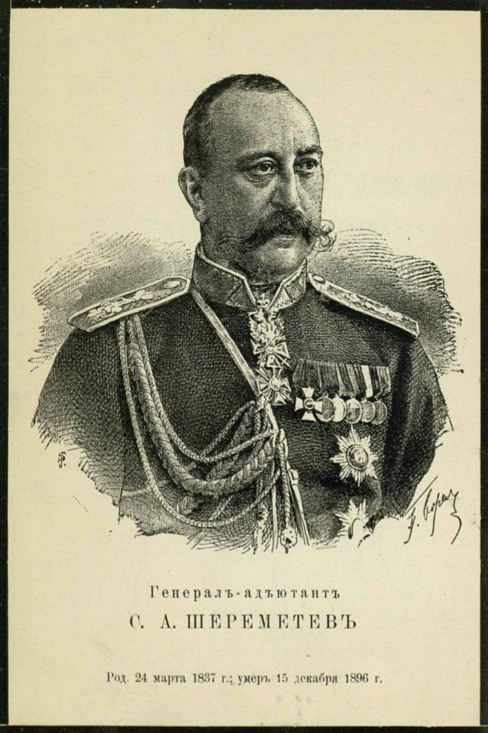 მეფისნაცვალი საქართველოში სერგეი შერემეტიევი